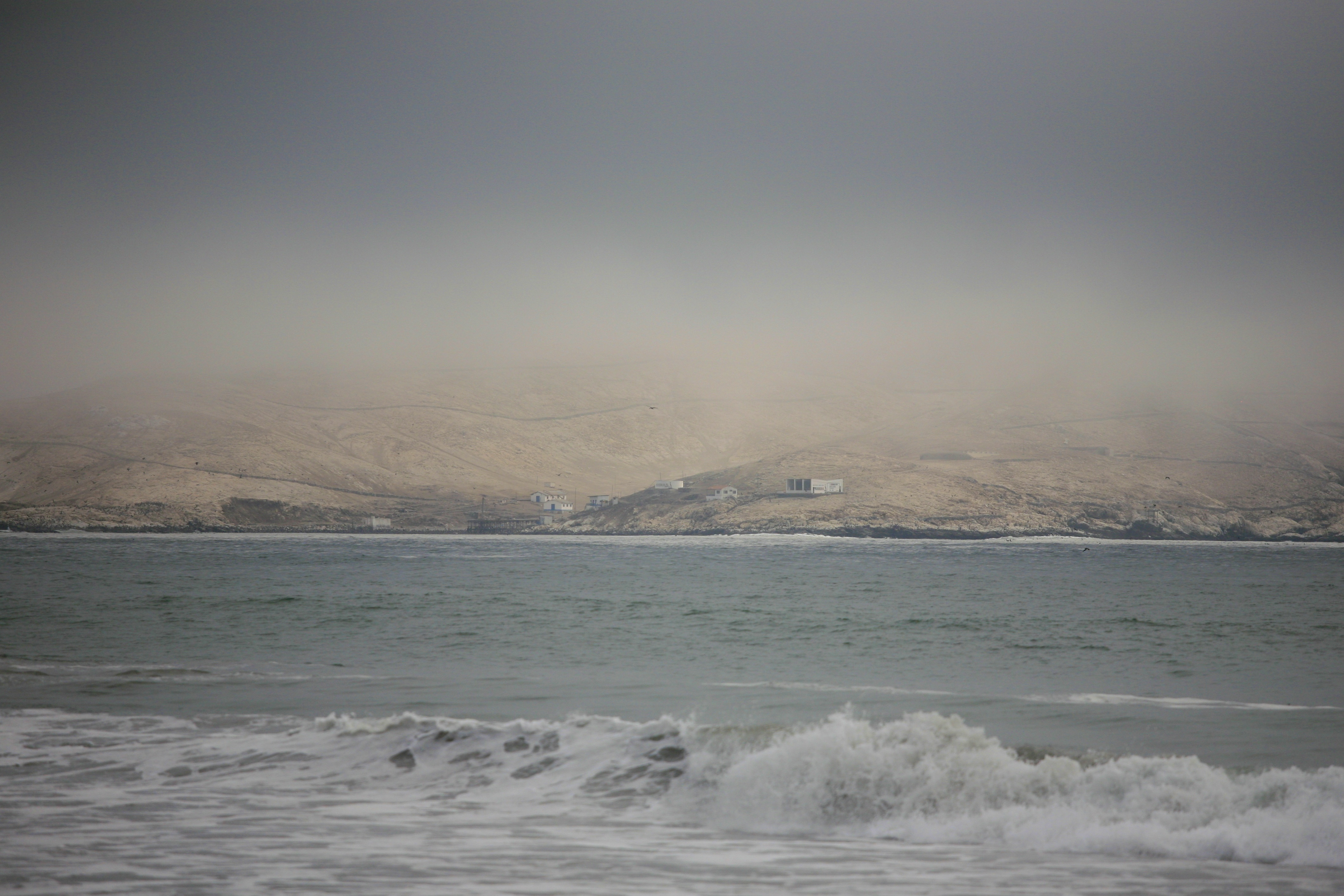 Playa de Asia, Peru